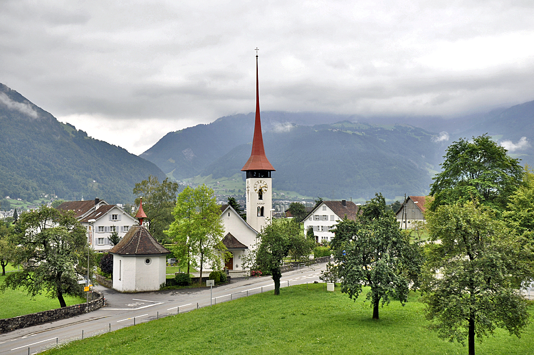 Seedorf UR